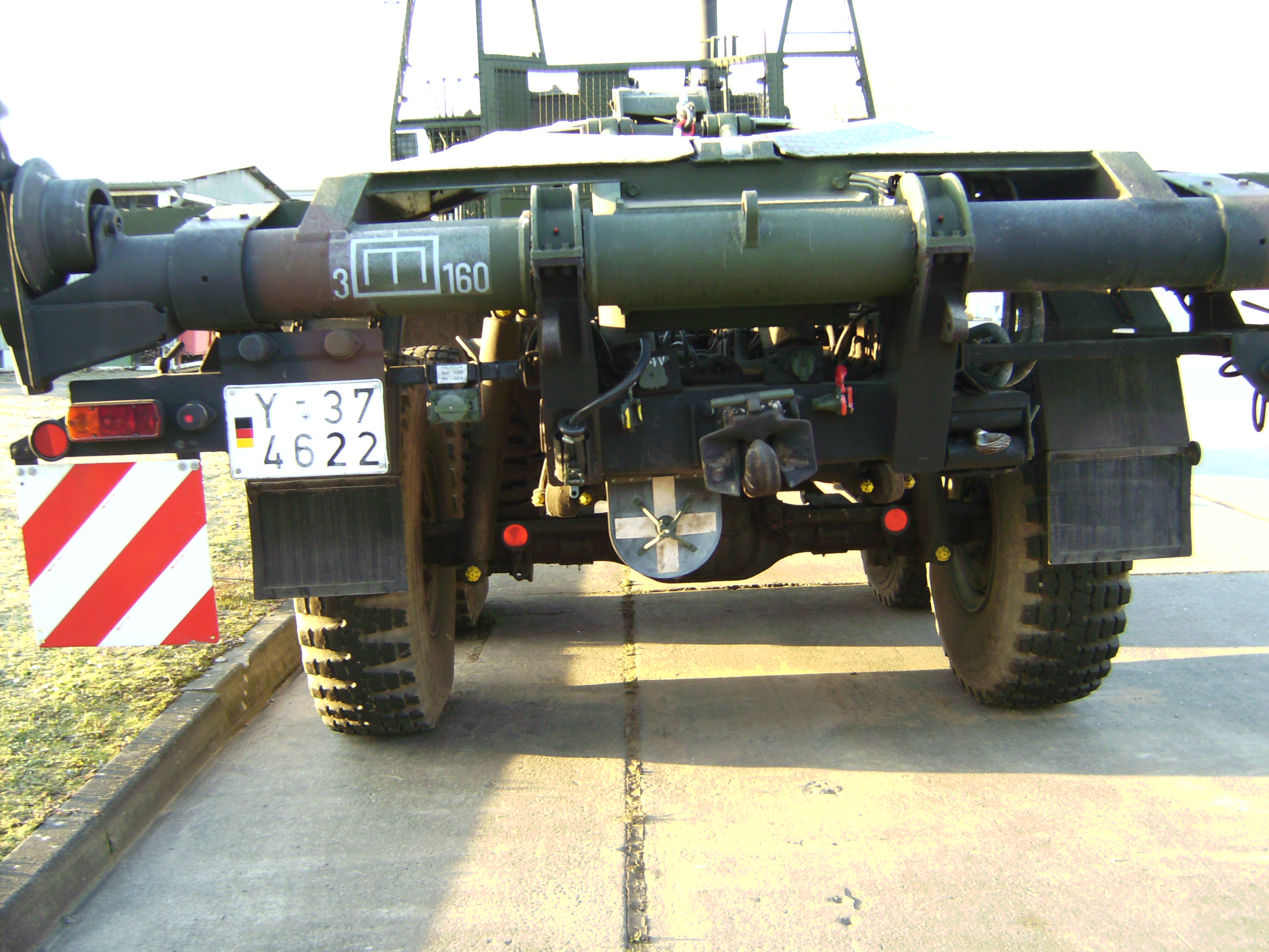 Brücken und M-Boot Transporter